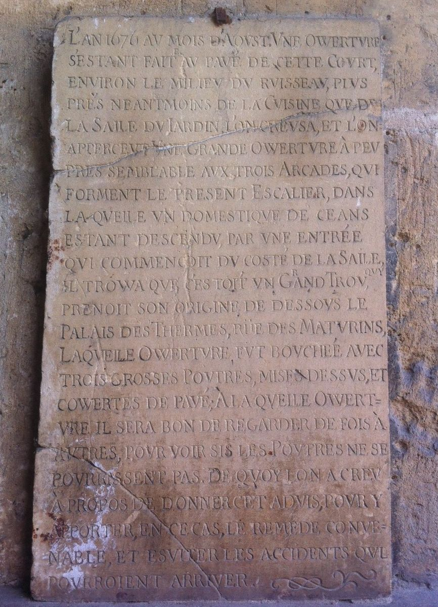 Plaque de l’hôtel de Cluny décrivant l'entrée des souterrains des Thermes en Août 1676.